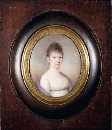 Porträt einer jungen Dame (vom Versteigerer geschätztes Datum, das nicht stimmen muss)